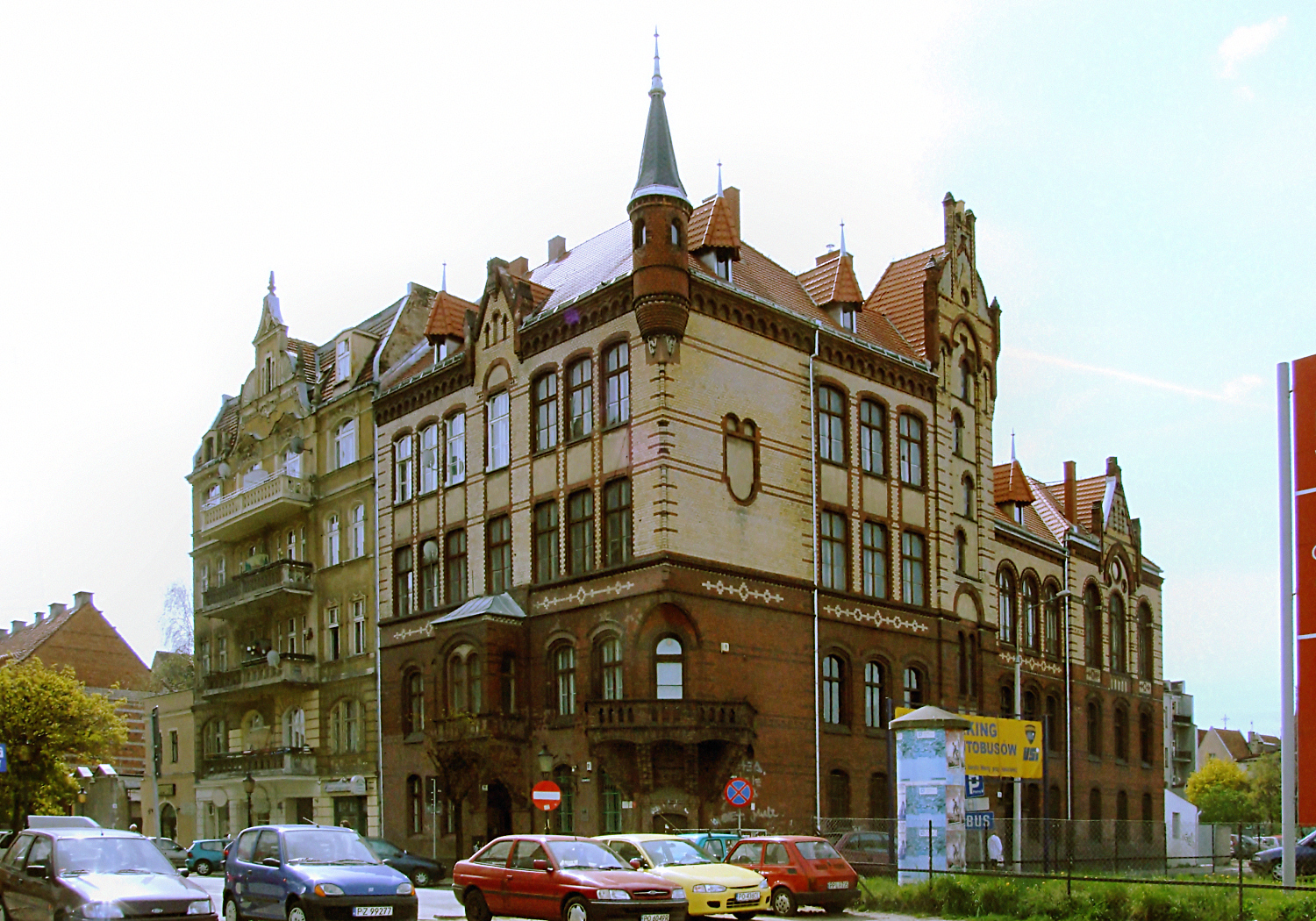 Poznań, ul. Stawna 10; Poznań, Stawna Street 10